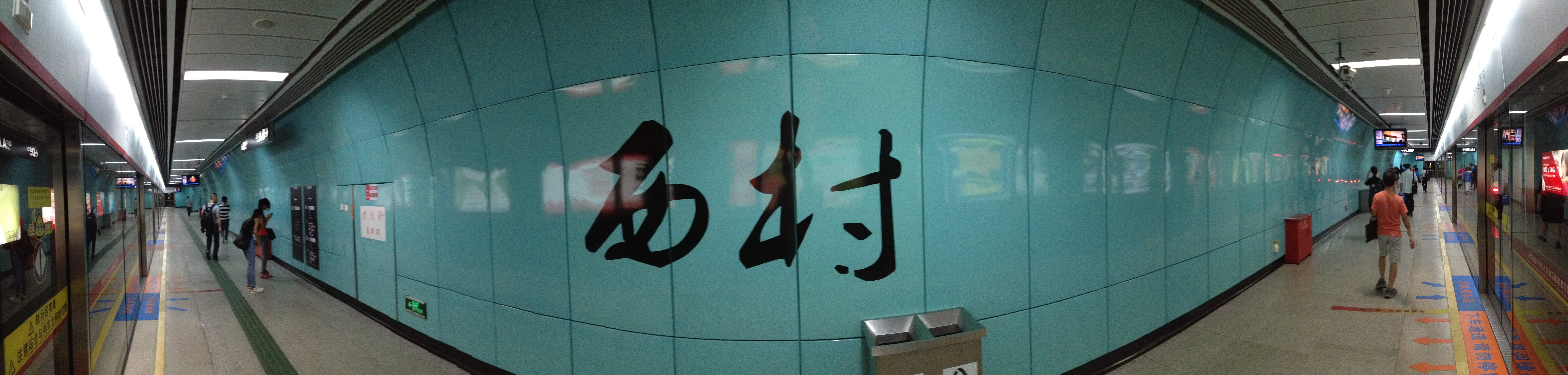 广州地铁5号线西村站月台全景图